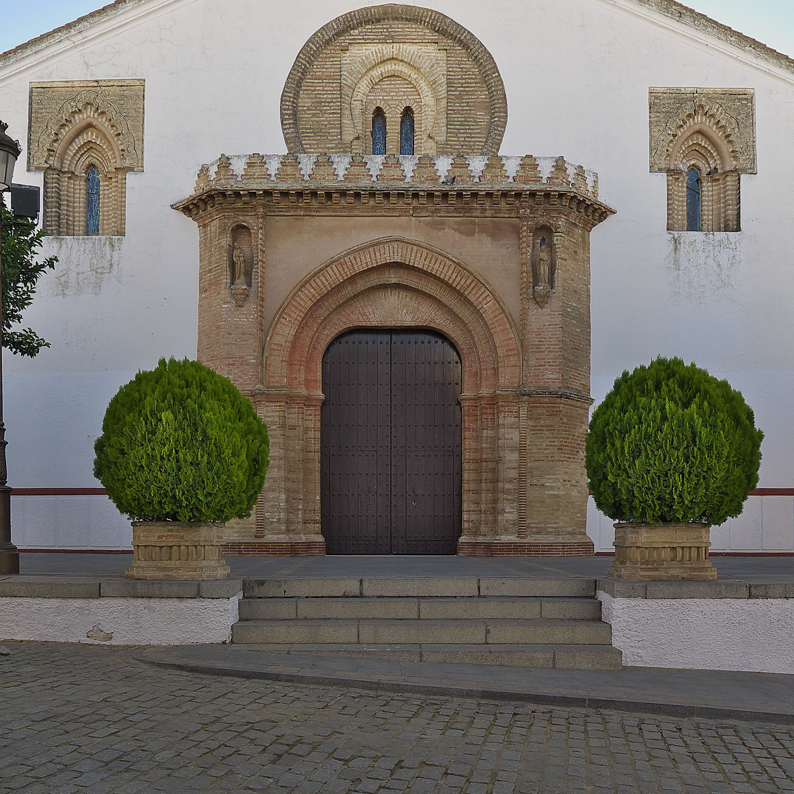 Portada de los pies de la iglesia. En el siglo XVI se modificó su composición primitiva.